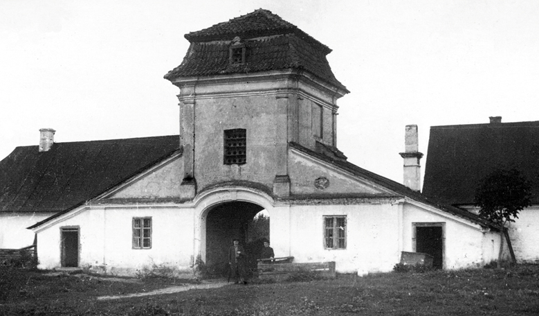 Удмурт: Острозька брама Бернардинського монастиря в Ізяславі.